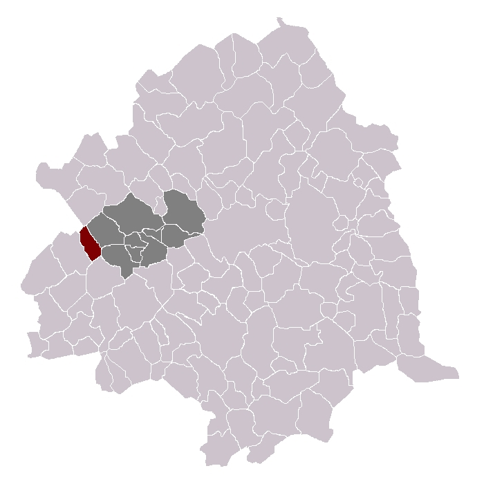 Le Maisnil dans son canton et son arrondissement